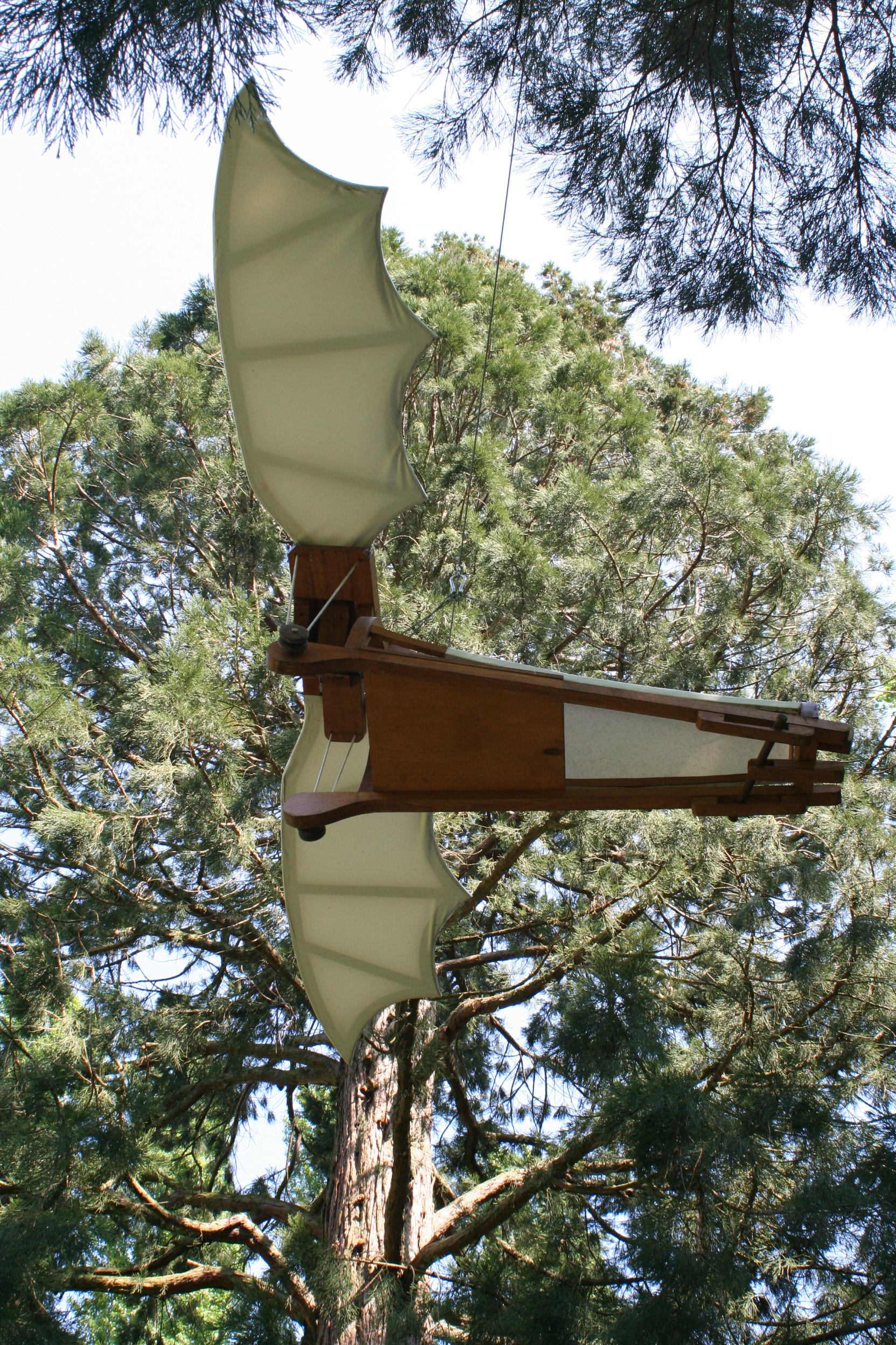 Flying machine, machine volante, Leonardo Da Vinci